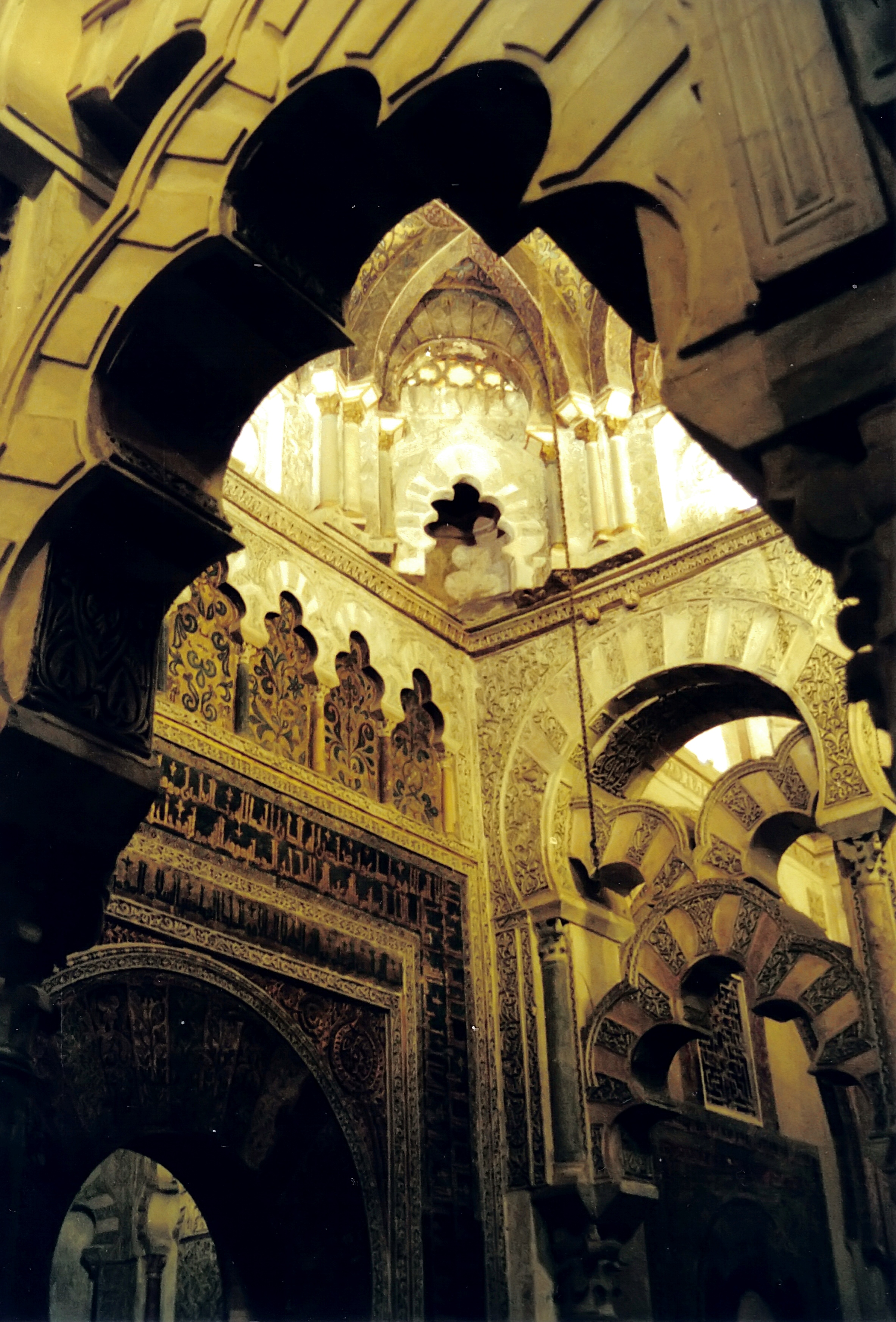 Cordoue - Mosquée - arcs polylobés de la clôture de la Maksourah